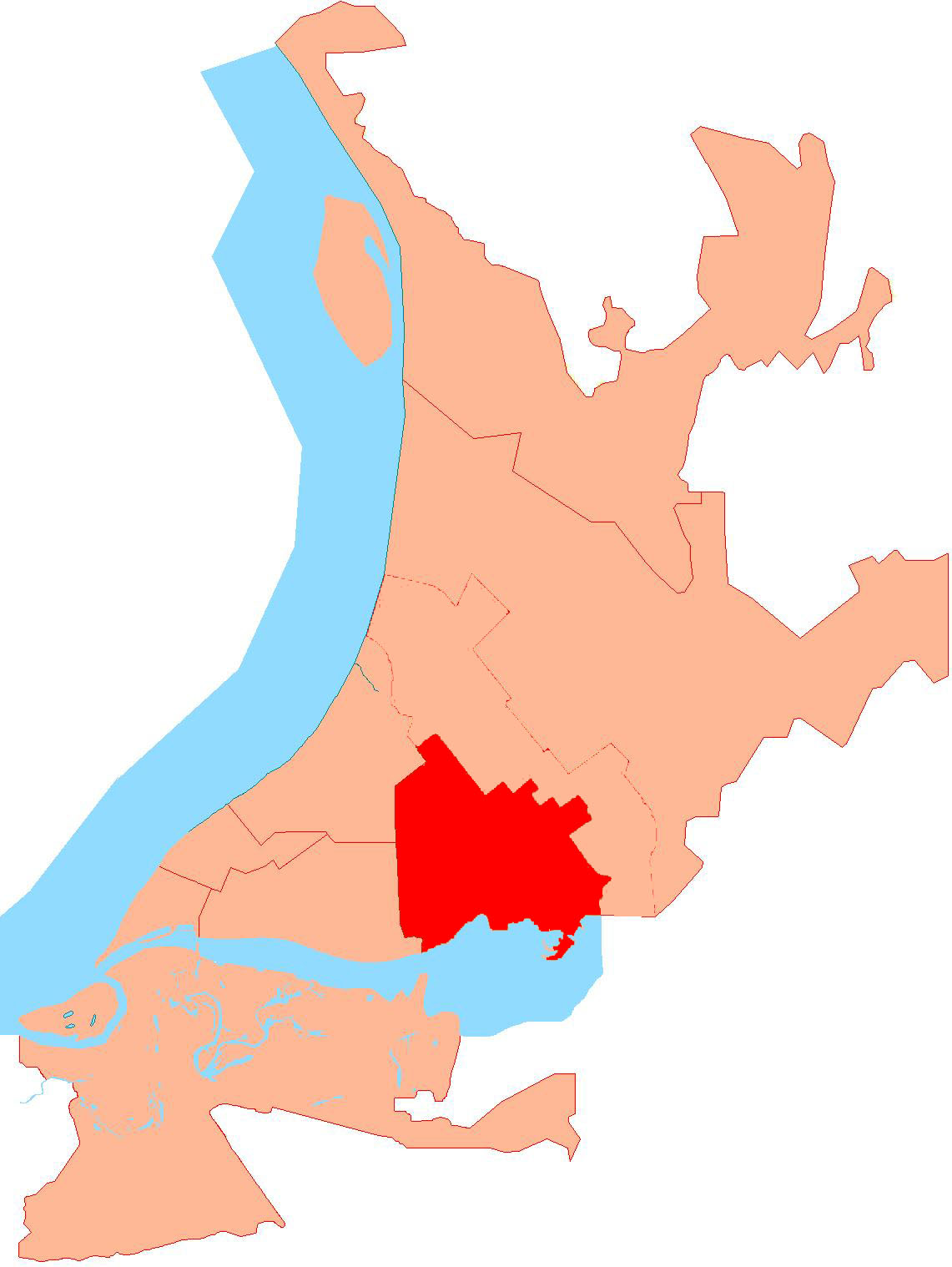 Samara district